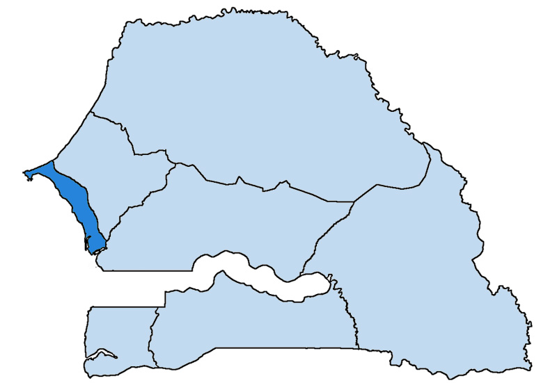 Mappa dell'arcidiocesi cattolica di Dakar, in Senegal. Anno 2009.